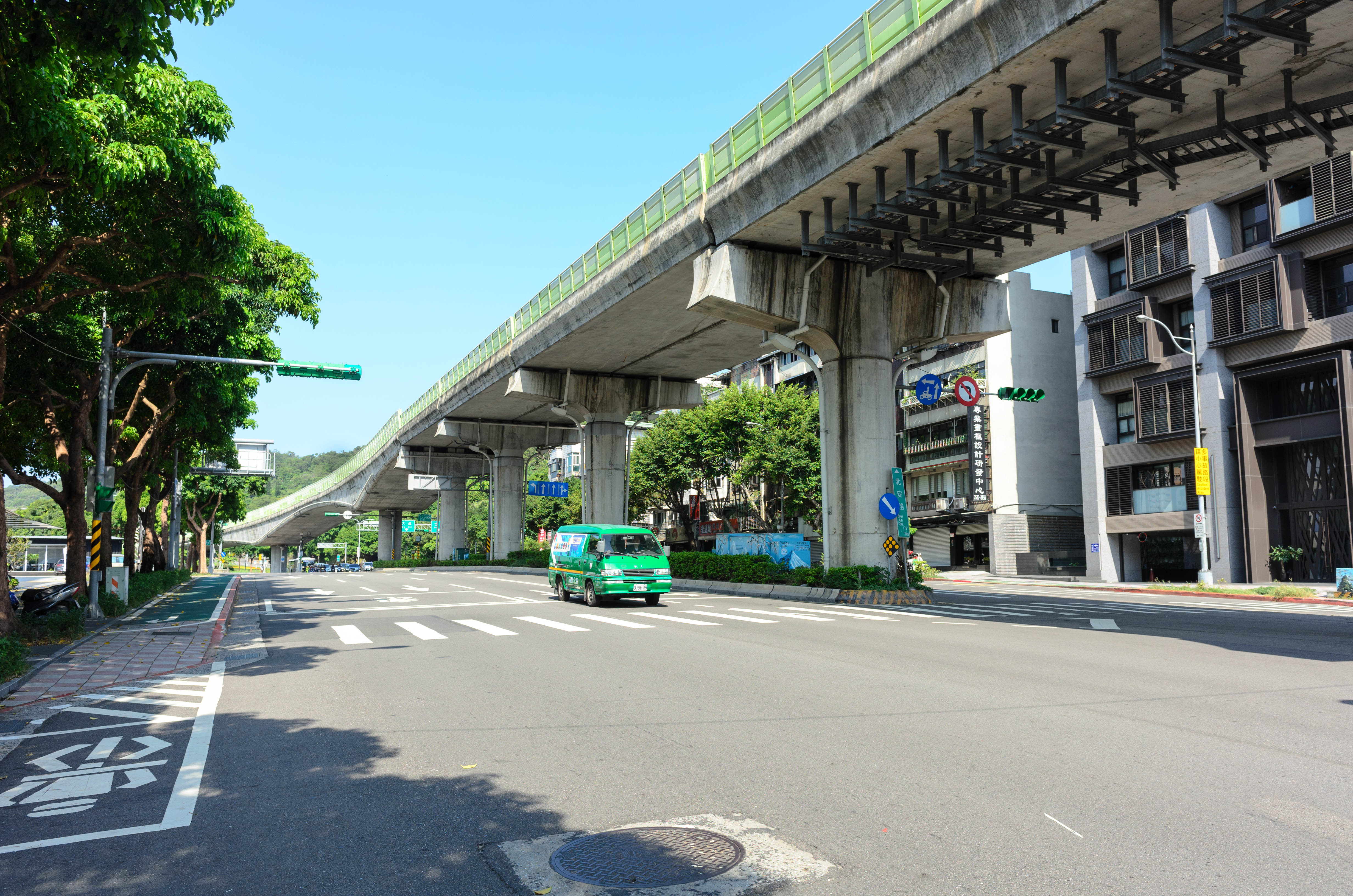 中文（台灣）: 從臺北市中山區北安路與敬業二路路口西望北安路與臺北捷運內湖線。